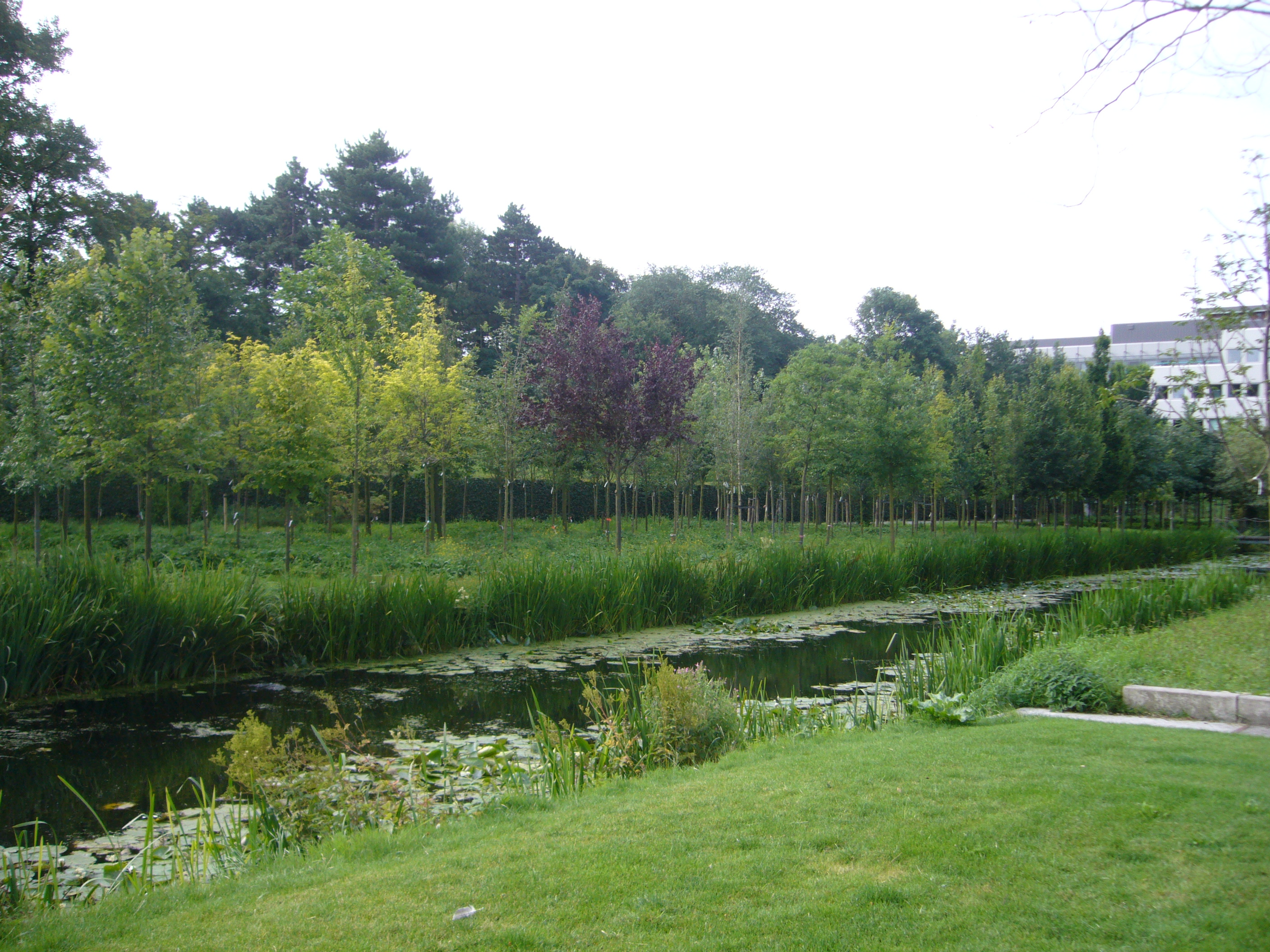 Kwekerij van de gemeente Den Haag